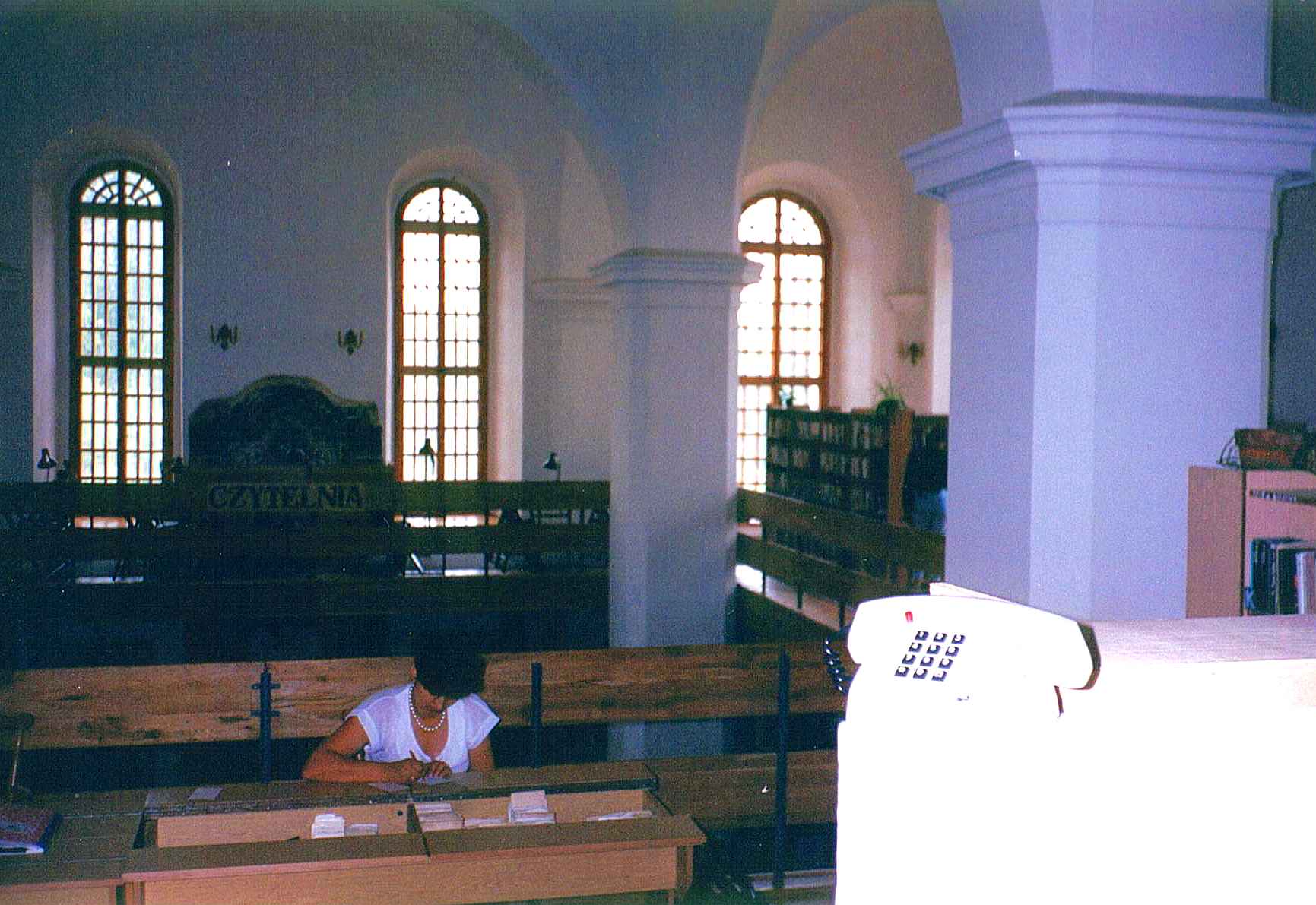 Tarnogród, Poland Interior of the synagogue (now library) Wnętrze synagogi tarnogrodzkiej (obecnie biblioteka)